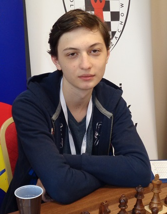 Dieses Bild stellt den Schachspieler Dmitrij Kollars vor einer Rundenpartie in den U18-Mannschaftseuropmeisterschaften in Rymanów-Zdrój , einer polnischen Kleinstadt und Kurort dar.